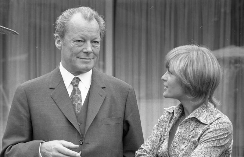 Bundeskanzler Willy Brandt empfängt Filmschauspieler